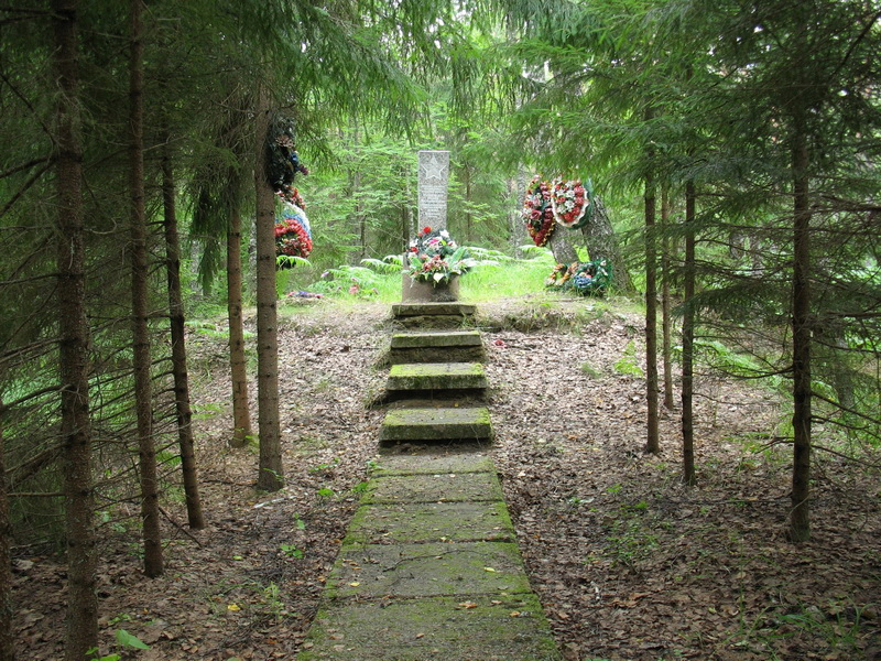 Основанием памятника служит холмик ДЗОТа. Вблизи памятника следы полевых укреплений Лужского рубежа обороны. Метров 500 от административного здания (одноэтажное строение) санатория, через речку по мосткам (слева от брода) и далее по дороге до беседки. Title:Памятный знак в честь погибших воиновPlace:Лужское городское поселение, посёлок Санаторий «Жемчужина», 500 метров юго-западнее главного зданияBuilt:нет информацииApproved:решение Леноблисполкома № 189 от 16.05.1988